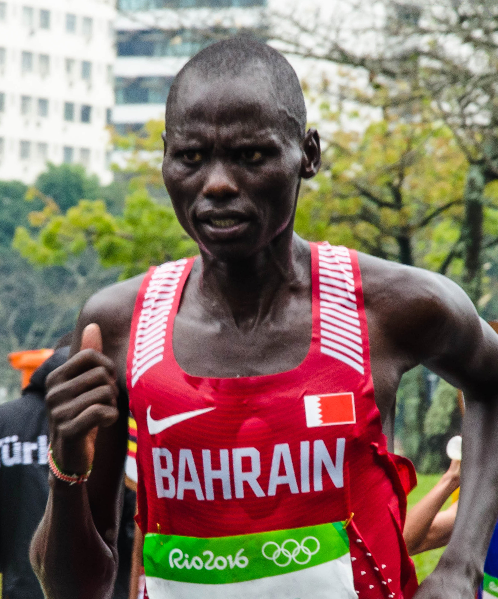 Isaac Korir, atleta do Bahrain, na última volta do Aterro do Flamengo na Maratona Rio 2016.